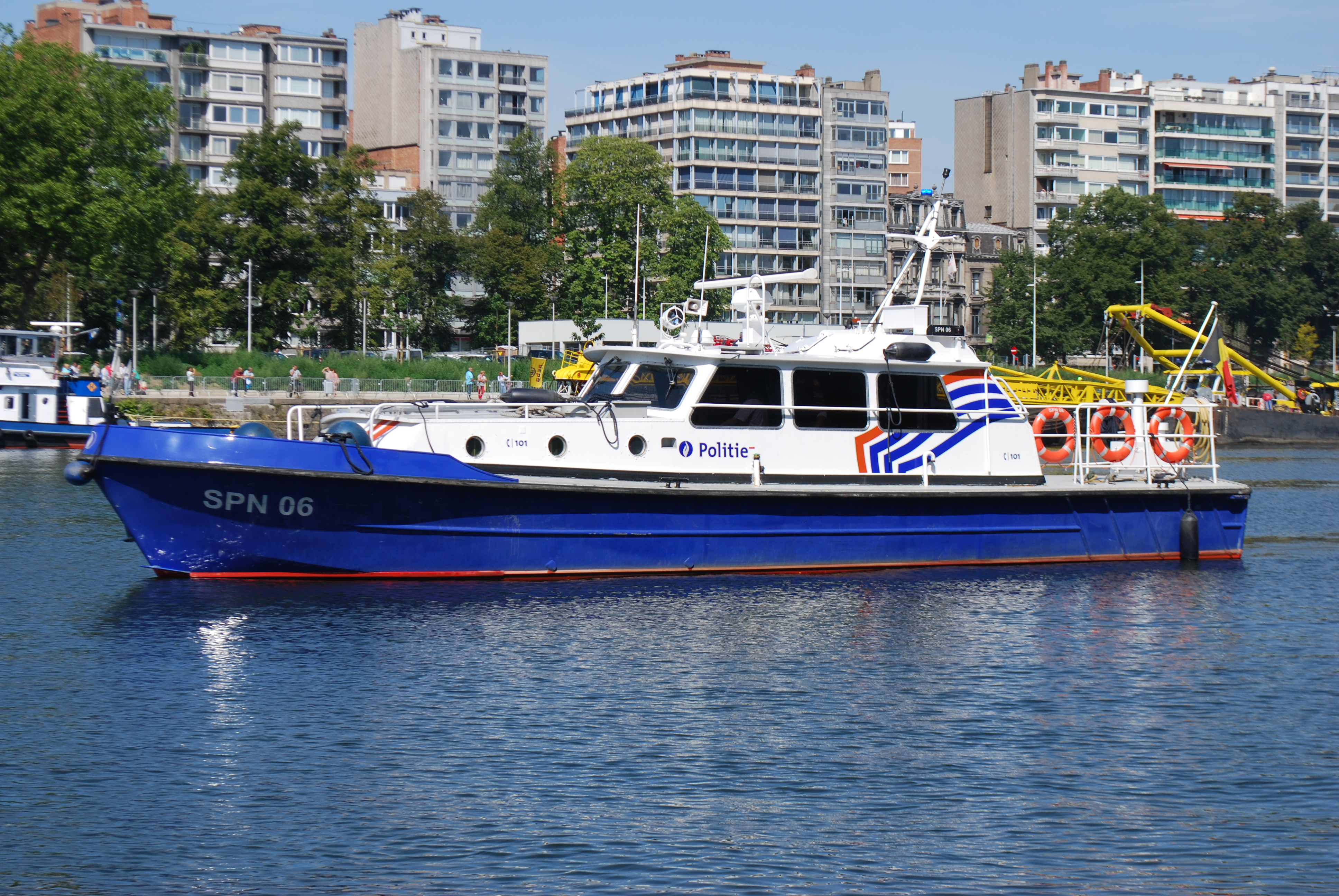 Vue de Liège.